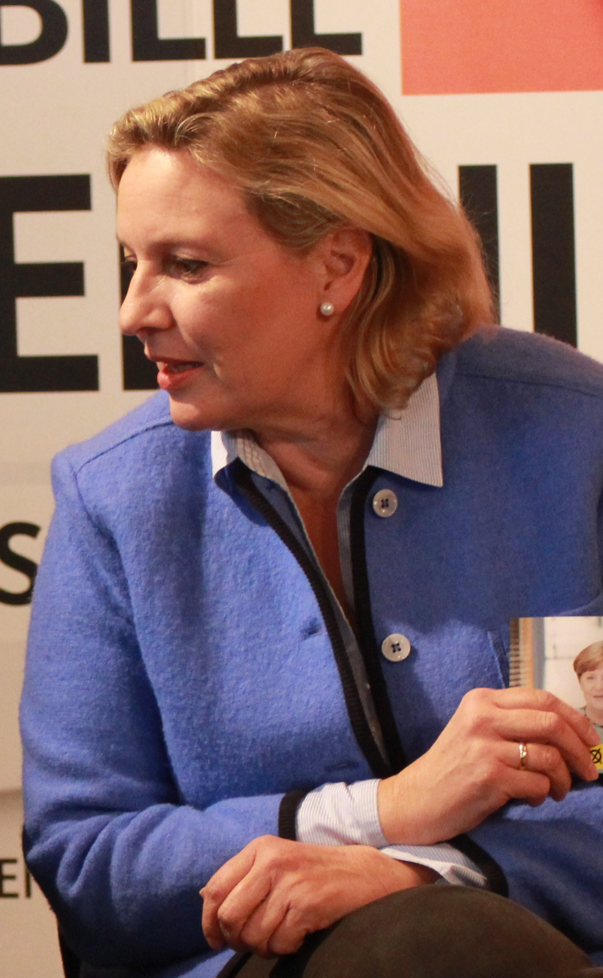 Simone Wendland (* 31. März 1963 in Münster) ist eine deutsche Politikerin (CDU). Sie ist seit dem 1. Juni 2017 Mitglied des 17. Landtags von Nordrhein-Westfalen. Das Bild entstand auf dem Sommerempfang der Münsteraner CDU am 19. September 2017 in der Friedenskapelle im Friedenspark Münster.